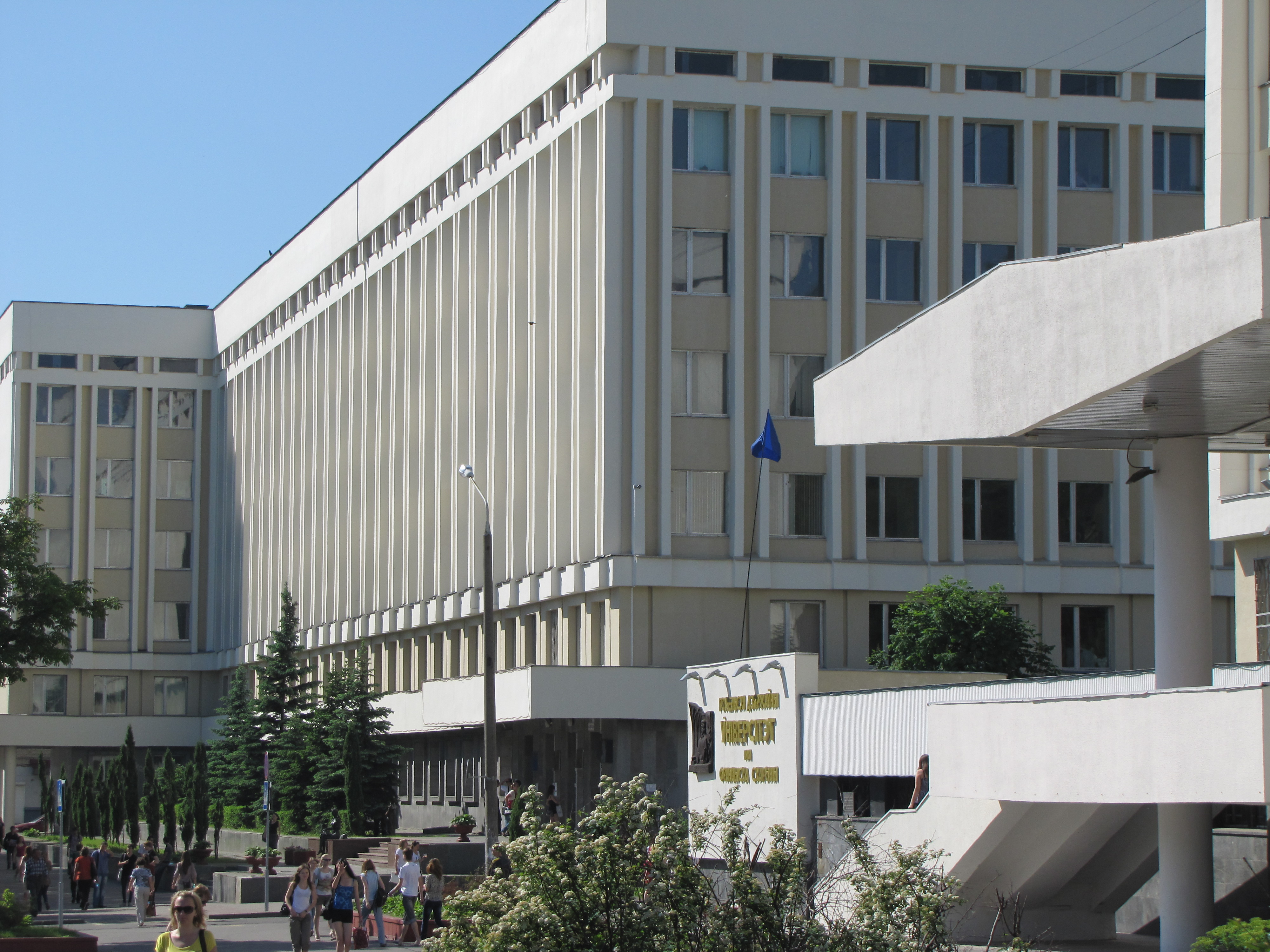 5 корпус ГГУ